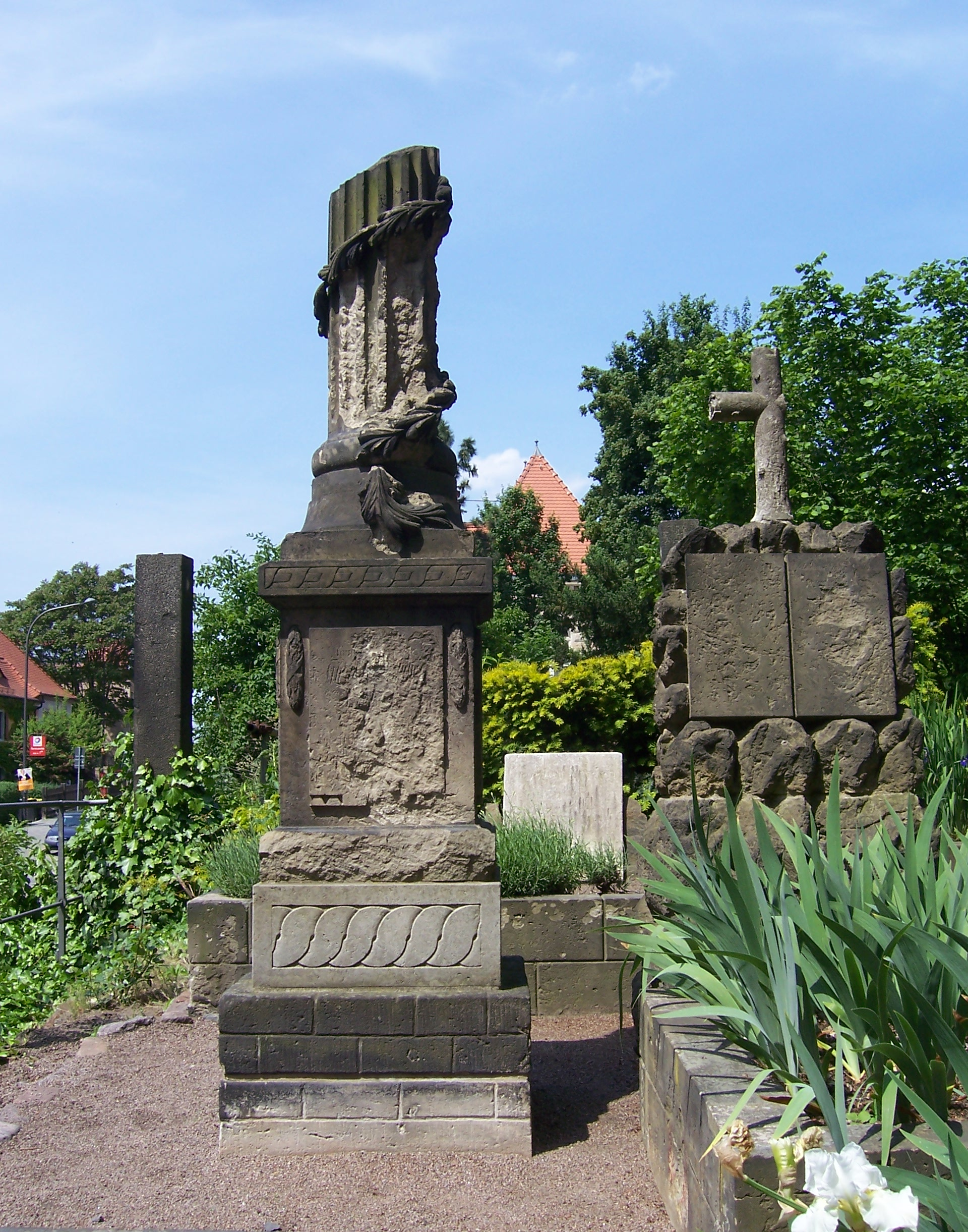 Loschwitzer Kirchhof, heutige Ansicht einer Aufnahme von August Kotzsch aus dem Jahr 1870.